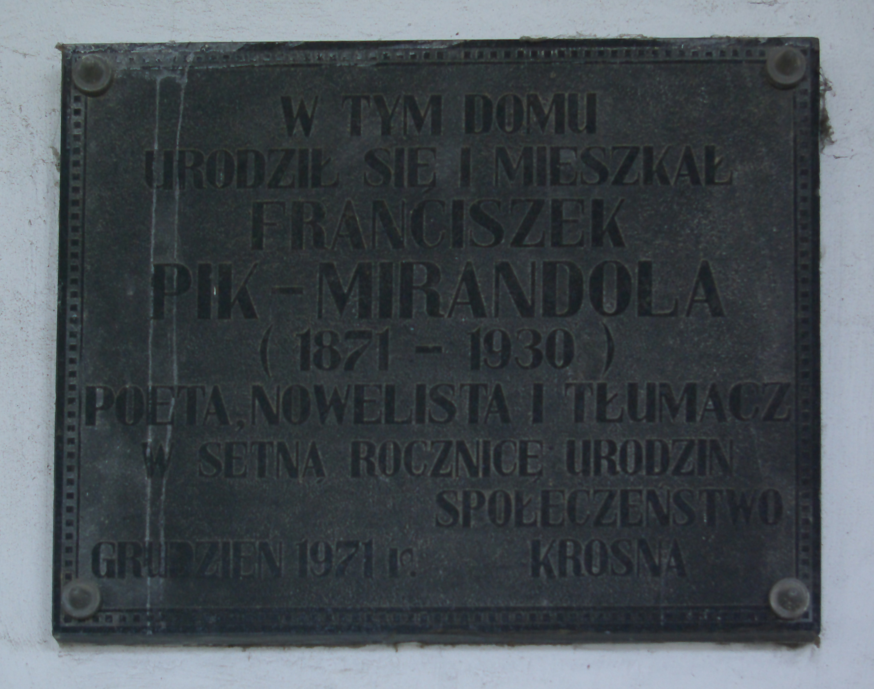 Kamienica przy ulicy Rynek 8 w Krośnie. Na fasadzie kamienicy przy ulicy Rynek 8 w Krośnie, nabytej w 1867 przez aptekarza Wojciecha Pika, w której urodził się jego syn Franciszek, w setną rocznicę urodzin poety w grudniu 1971 została ustanowiona tablica upamiętniająca.